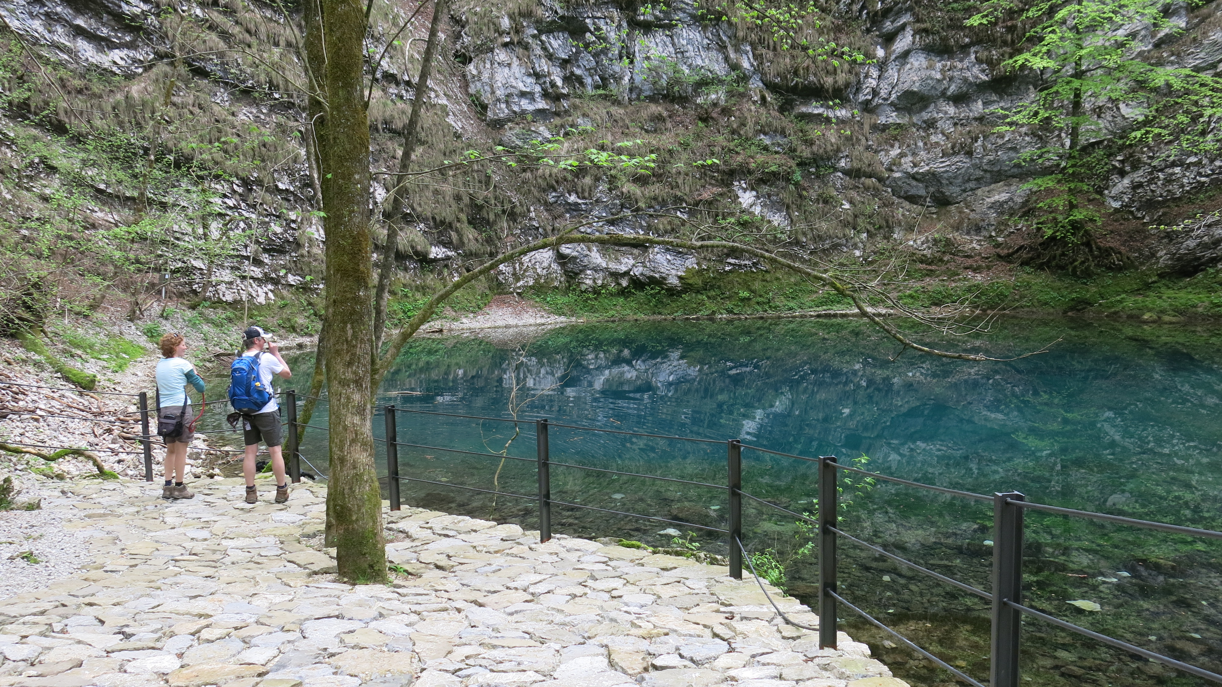 Divje jezero, april 2013